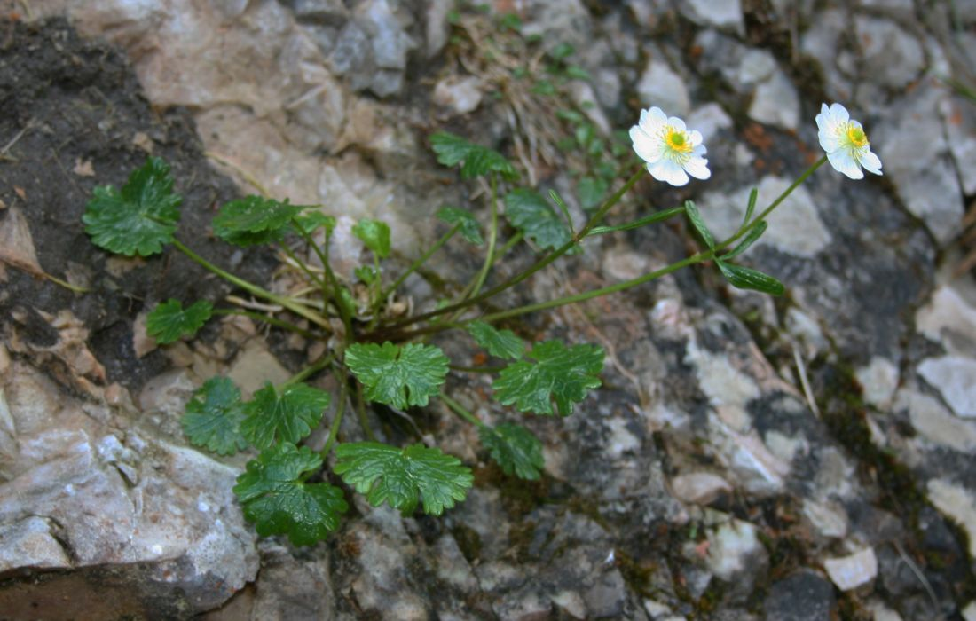 Alpen-Hahnenfuß (Ranunculus alpestris), Hahnenfußgewächse (Ranunculaceae) - Österreich/Austria/Autriche: Steiermark, Ennstaler Alpen, Spitzenbachgraben W St. Gallen